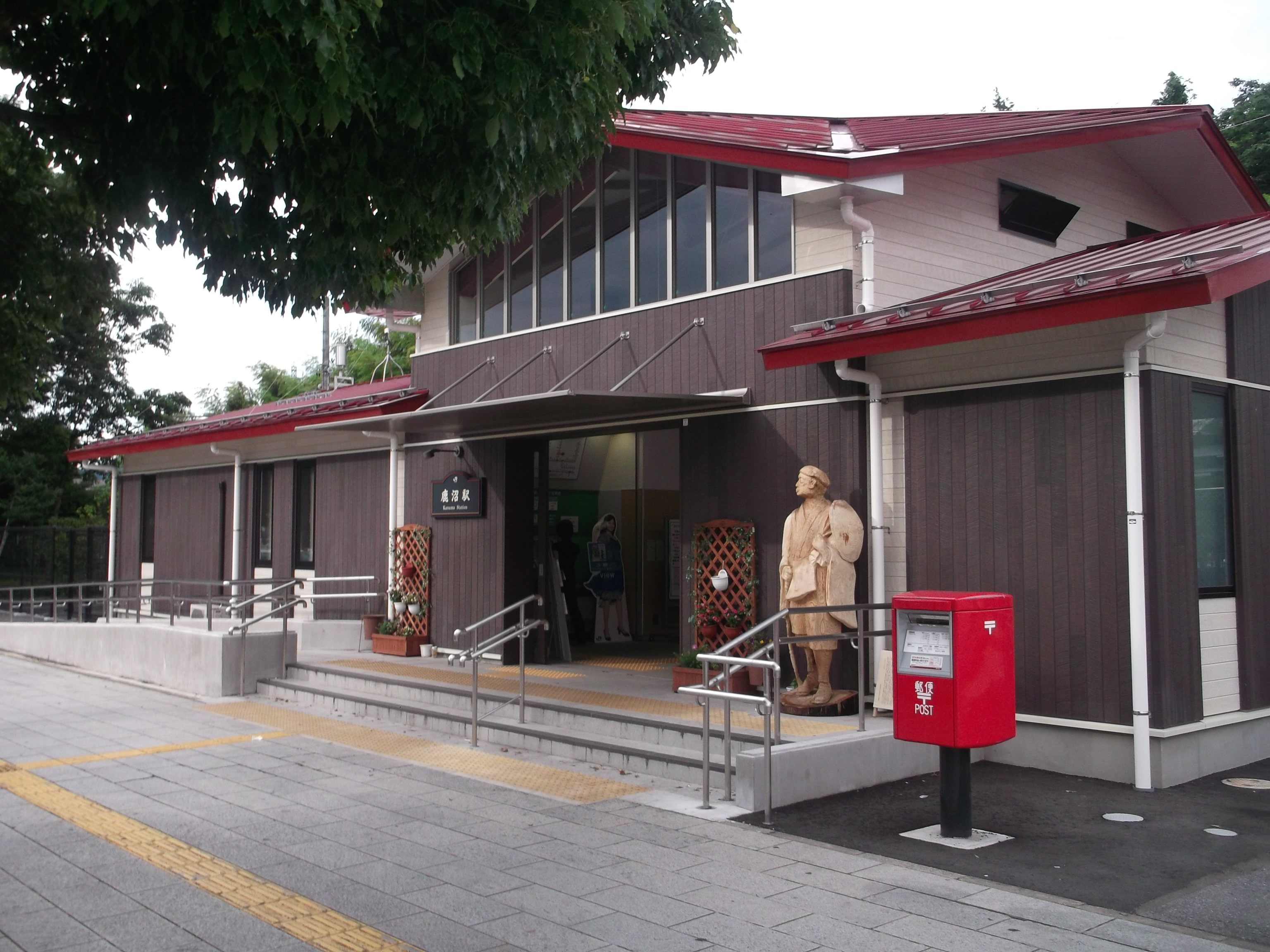 JR日光線 鹿沼駅駅舎 2014年7月20日撮影